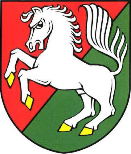 Znak obce Netunice